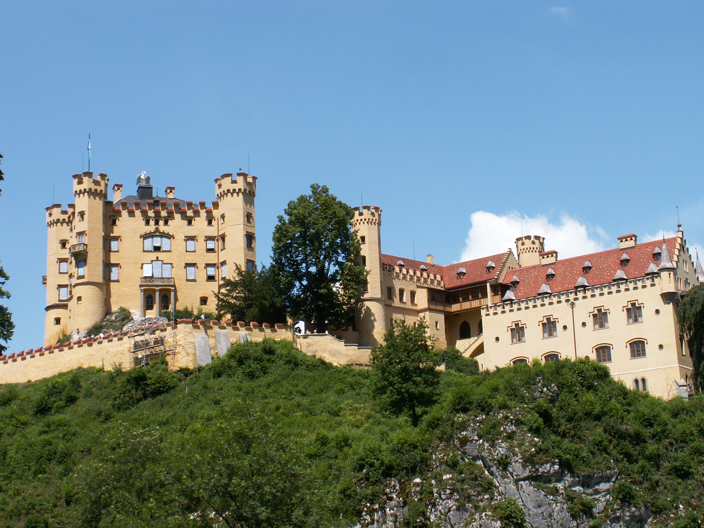 Hohenschwangau